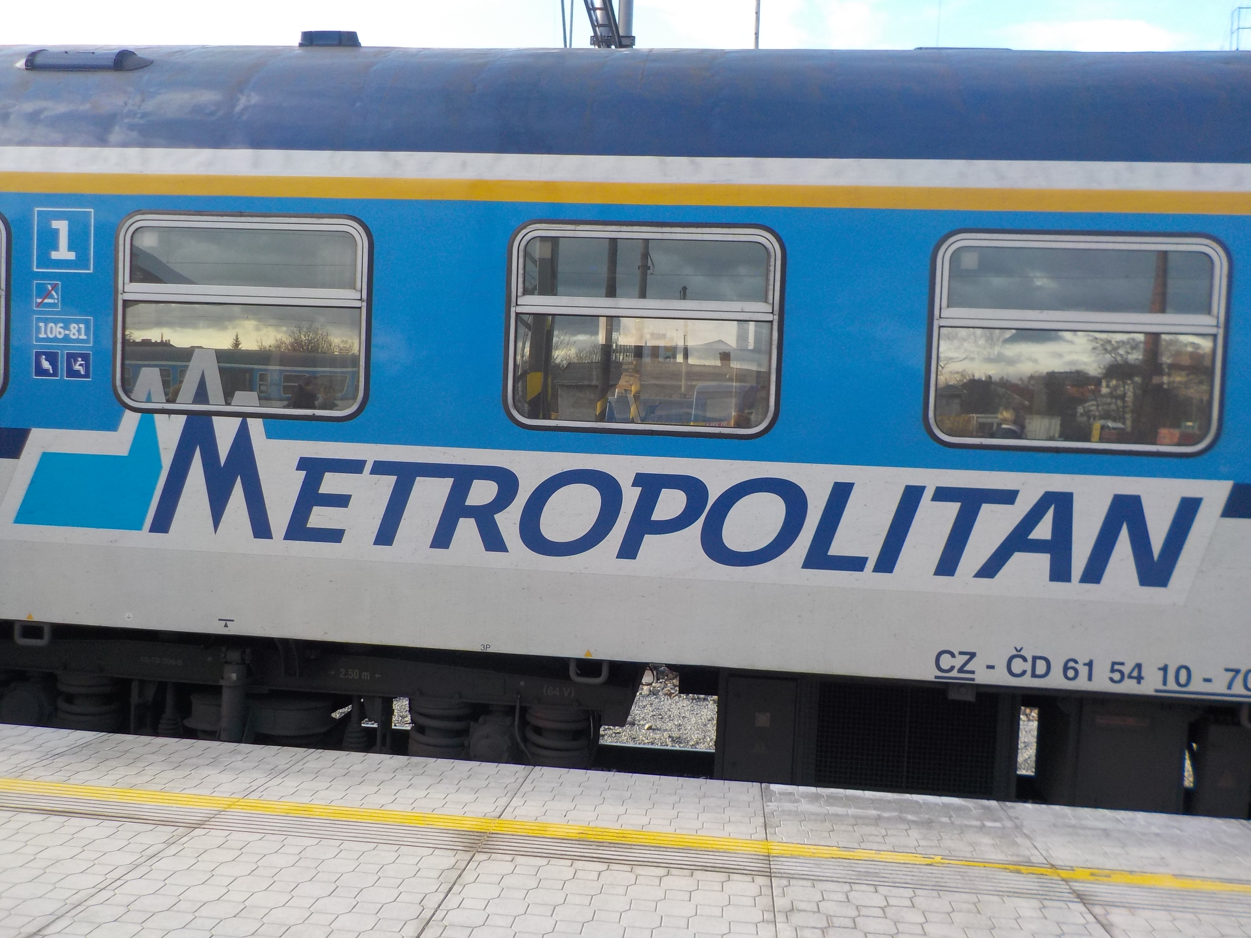 Označení "Metropolitan" na voze první třídy